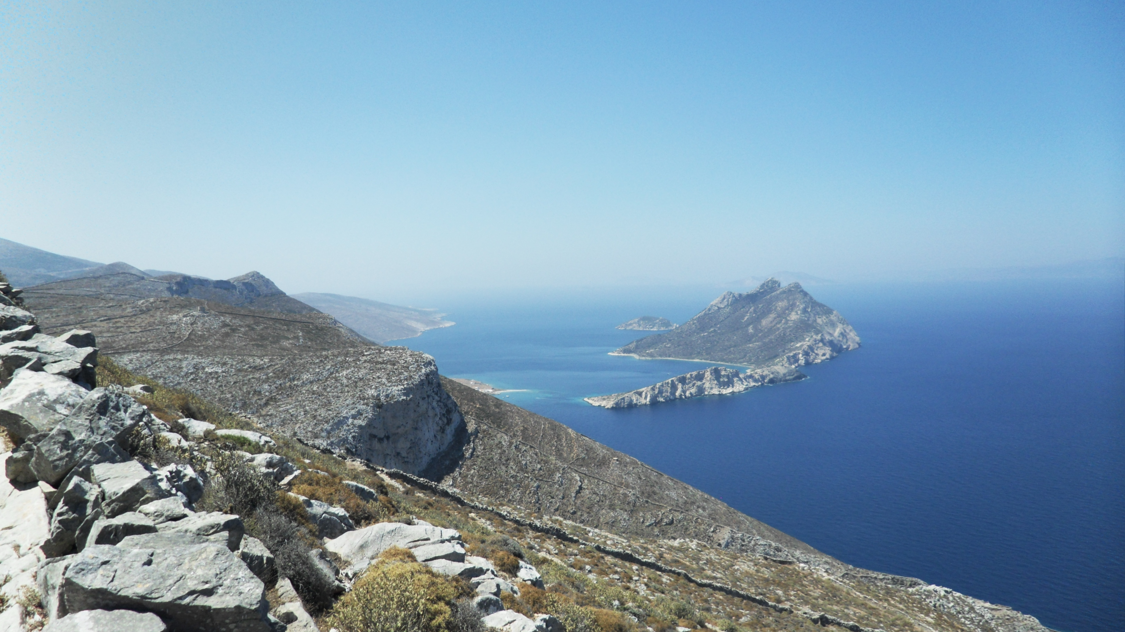 Nikouria depuis Amorgos